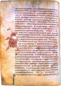 Фрагмент от среднобългарския книжовен шаметник Карпинско евангелие.